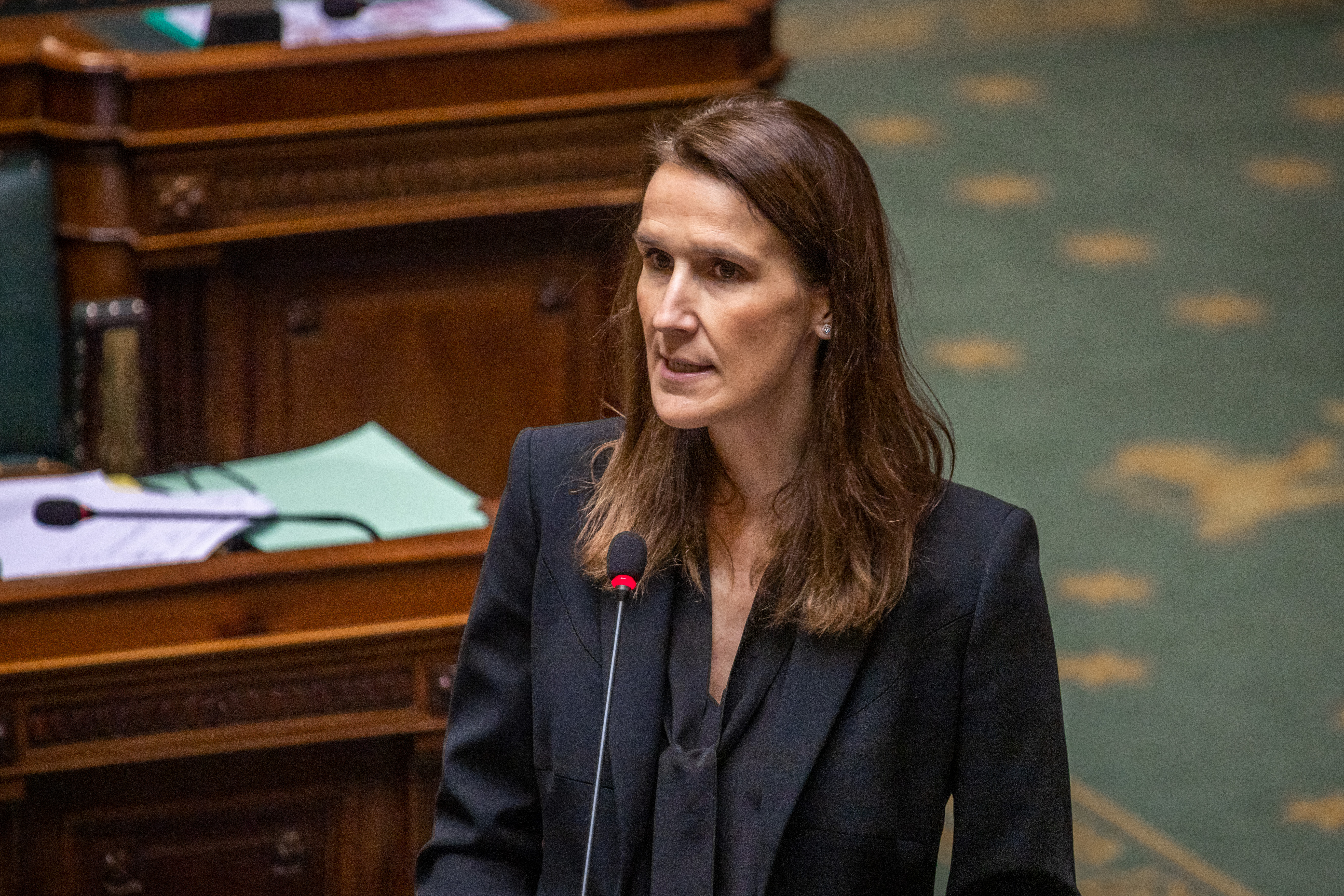 Sophie Wilmès à la Chambre des représentants